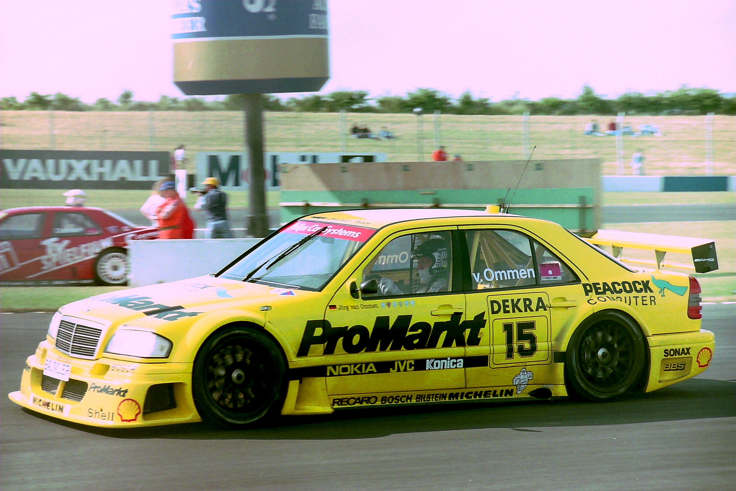 Jorg Van Ommen - Promarkt-Zakspeed Team - AMG-Mercedes C-Klasse